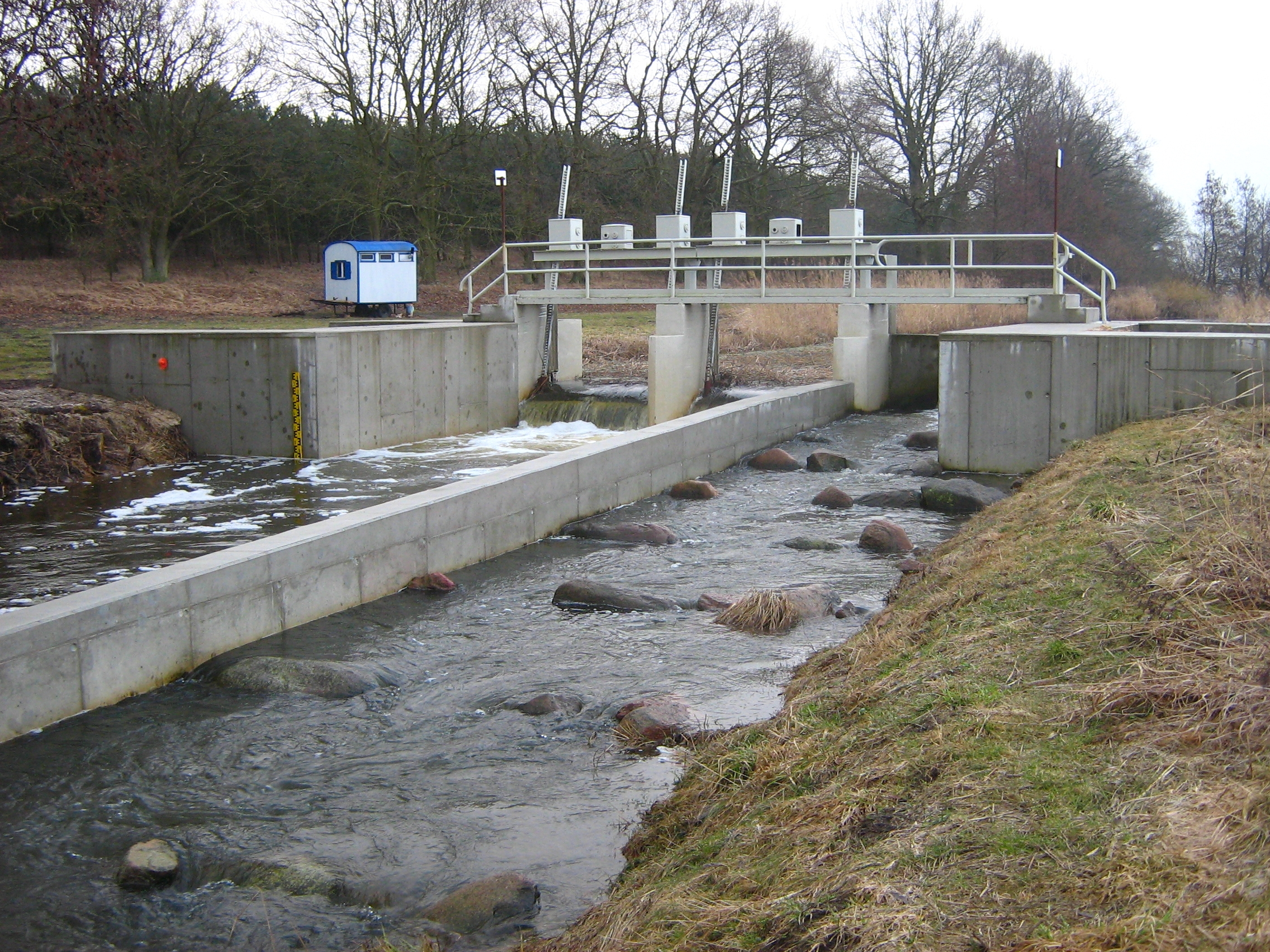 Die Randow bei unterhalb des Wehres mit Fischtreppe bei Löcknitz (Vorpommern).